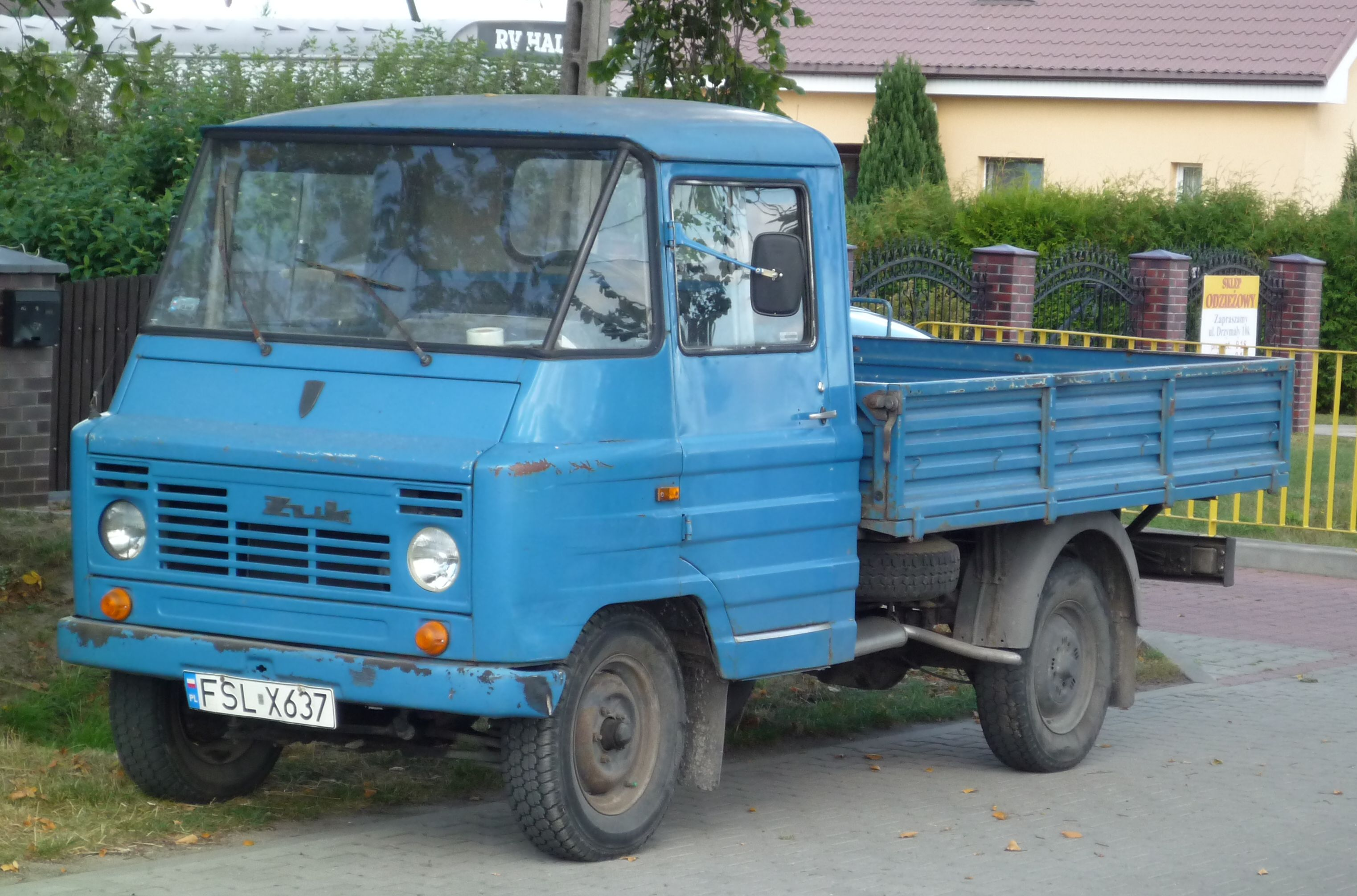 FSC Żuk A-11 B w Słubicach.